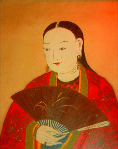 Họa phẩm Sĩ nữ đồ (仕女圖), treo ở bên phải ban thờ Đô Hồ đại vương Phạm Tu (范脩, 476 - 545), đình Ngoại, xã Thanh Liệt, huyện Thanh Trì, Hà Nội.